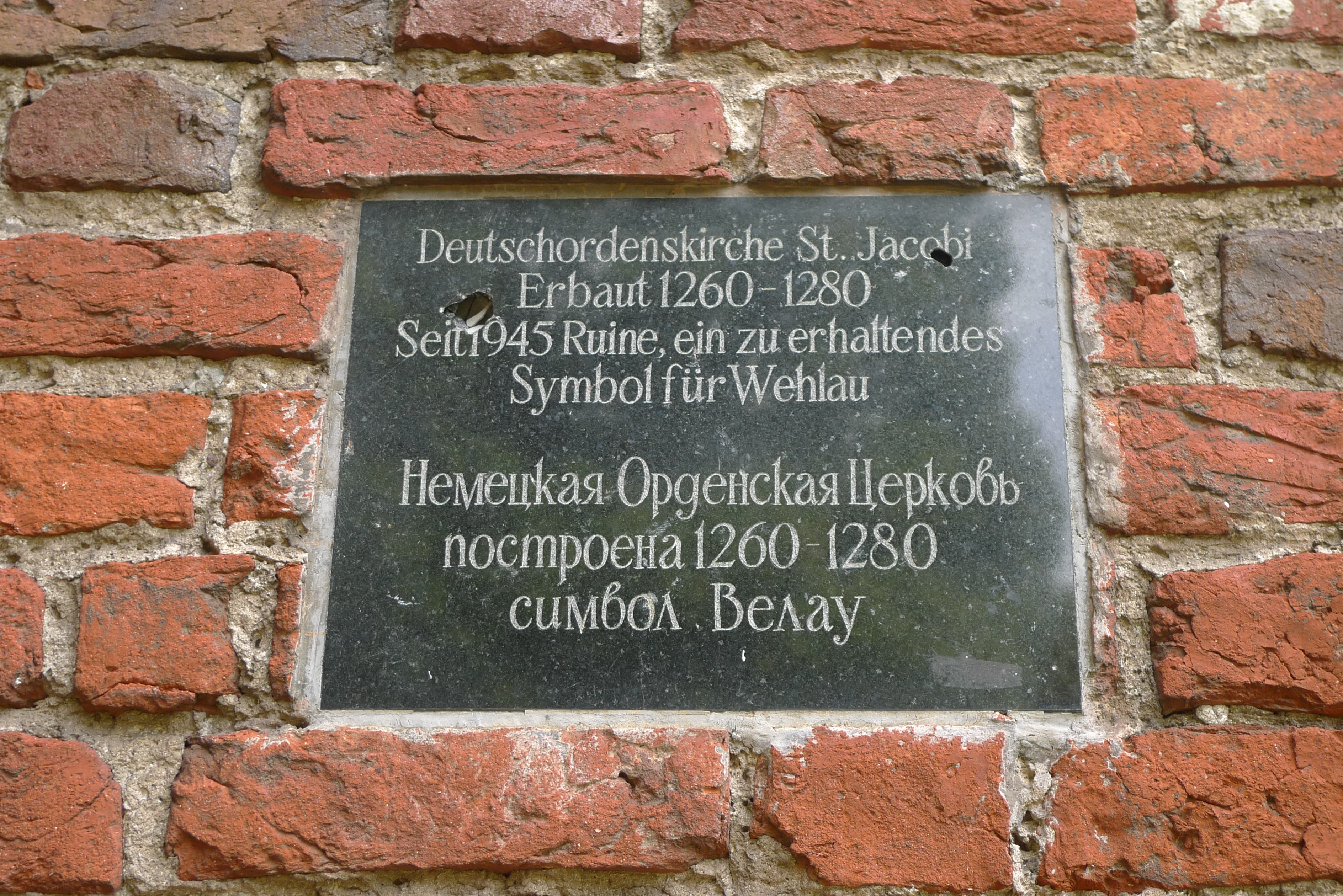 Кирха: Знаменск, Гвардейский район, Калининградская область